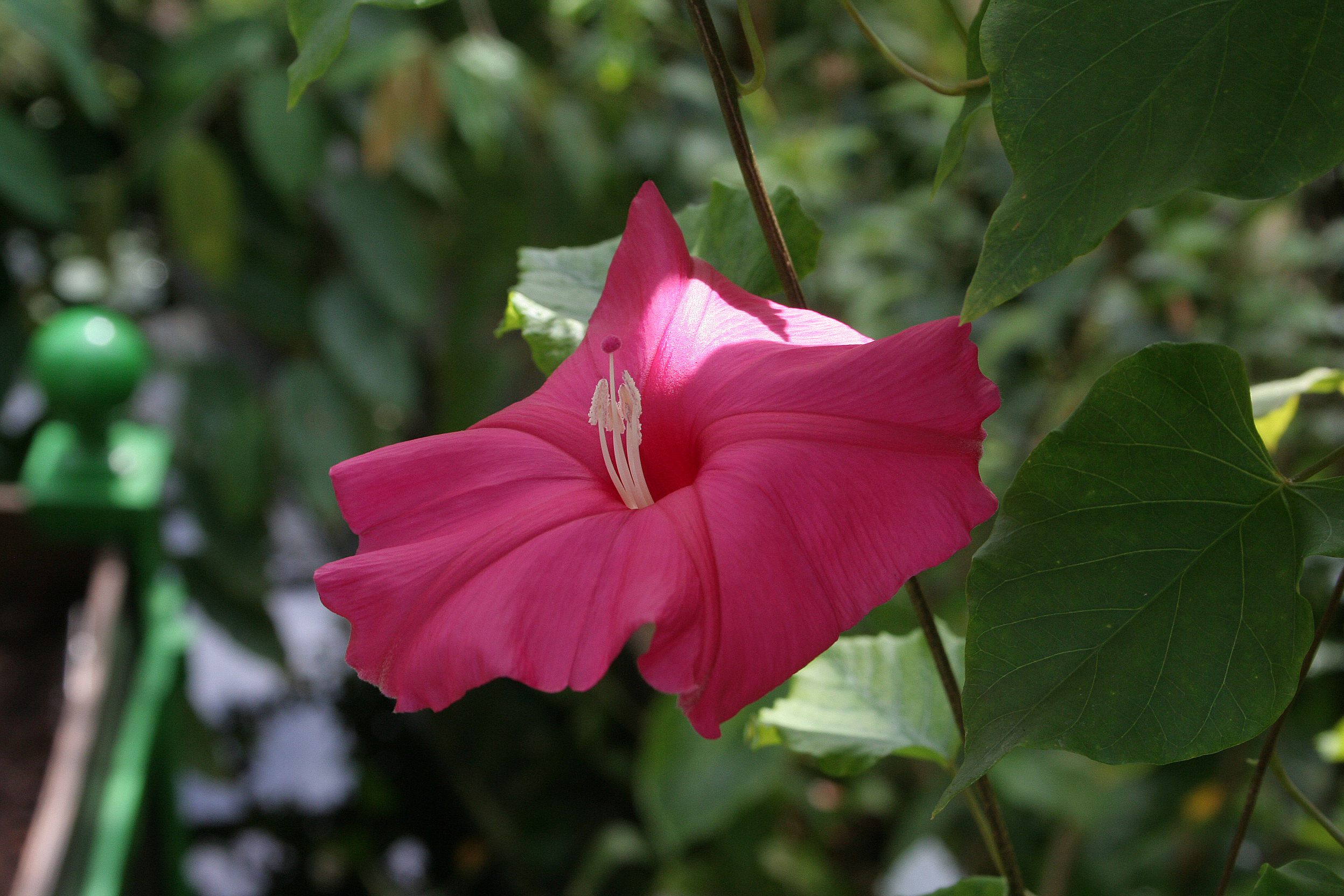 Turbina inopinata Conservatoire botanique national de Brest, France, juin 2007